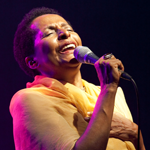 Susana baca en concierto